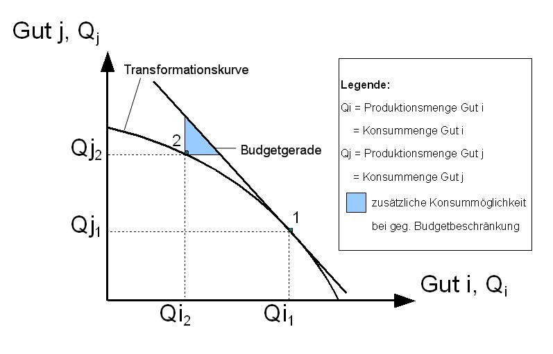 Außenhandel weitet trotz gegebener Budgetgerade die Konsummöglichkeiten einer Volkswirtschaft aus